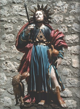 Nicola Mastrocinque. Statua di San Rocco di Foglianise.